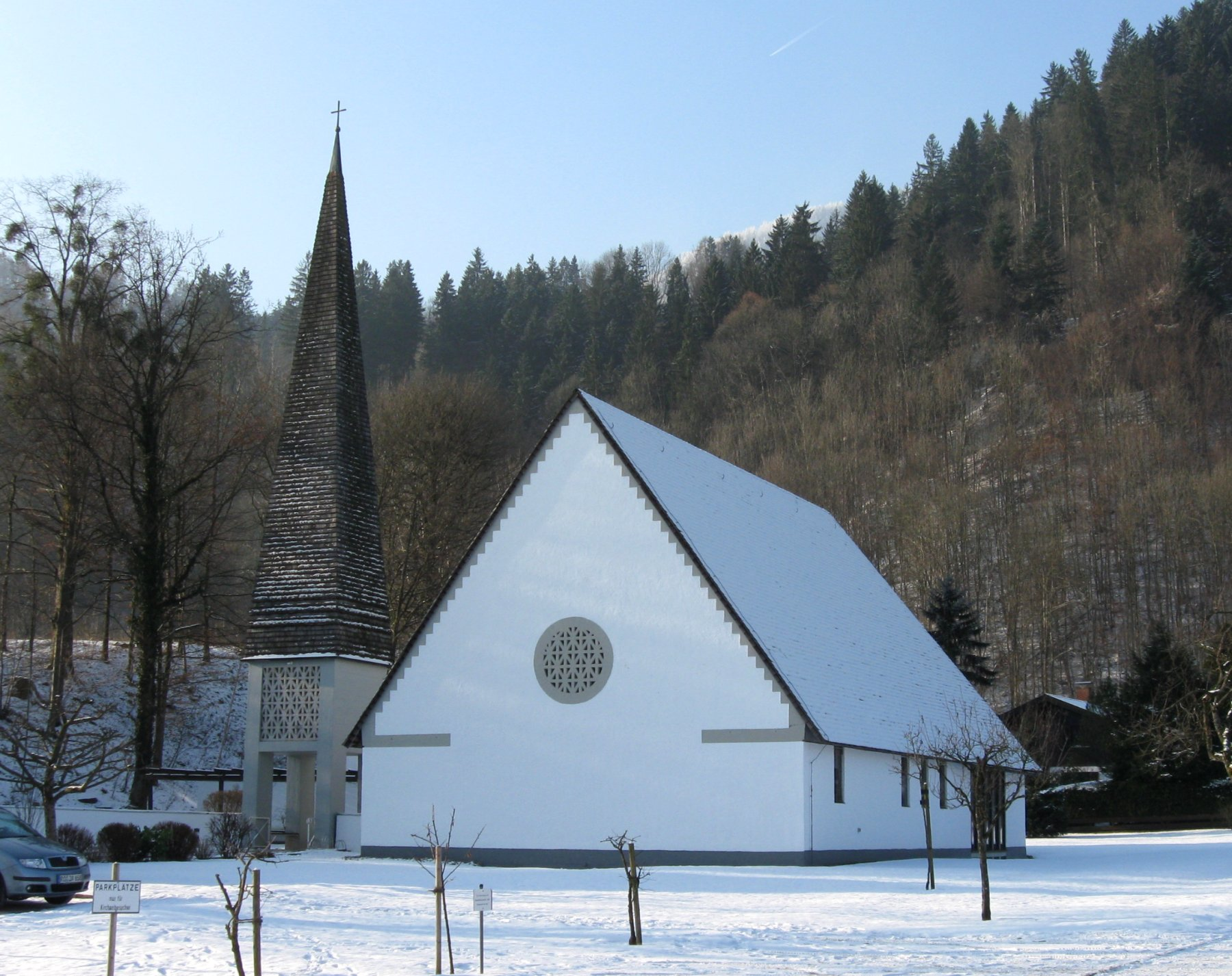 Evangelische Auferstehungskirche in Oberaudorf, Bad-Trißl-Straße 33